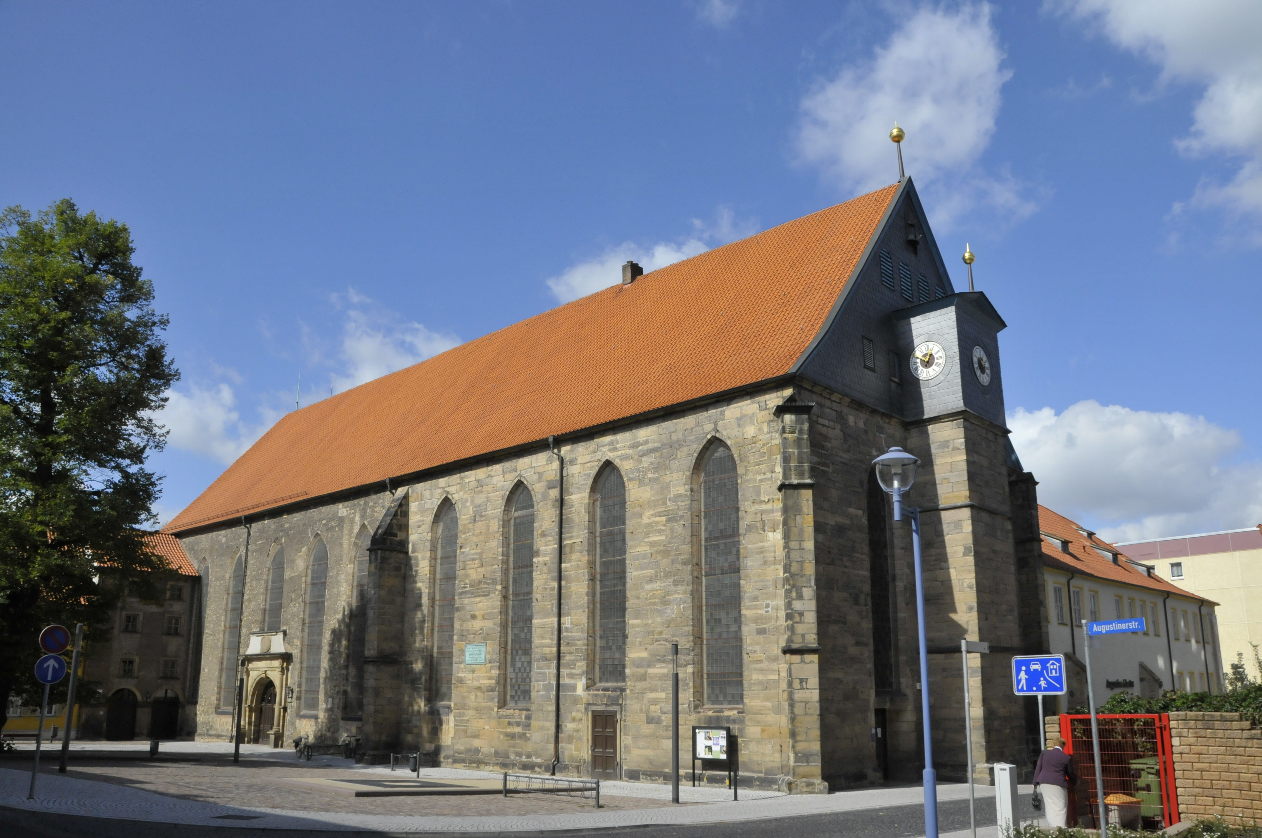 Gotha, Augustinerkirche